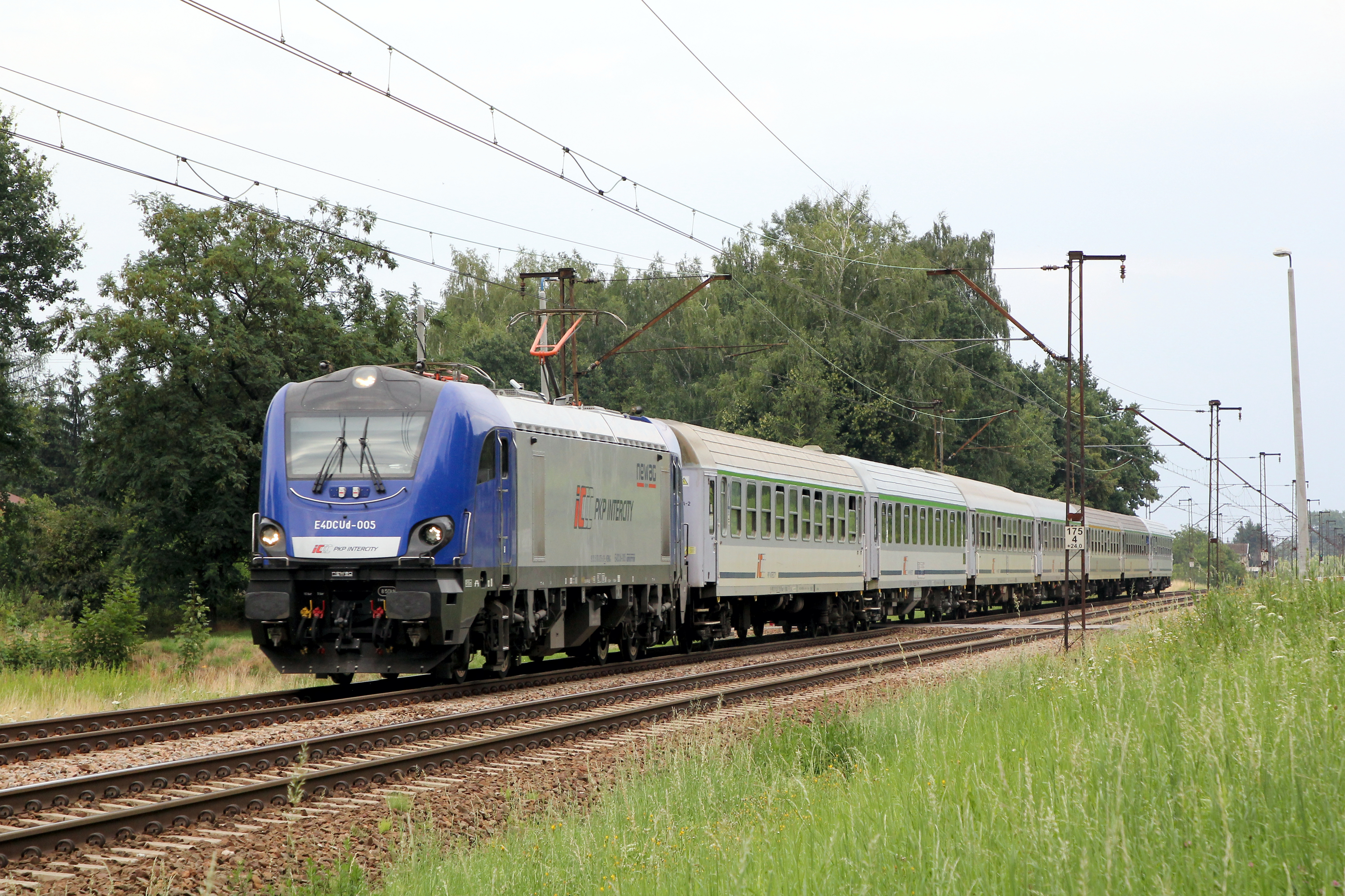 E4DCUd-005 IC-31100 MALINOWSKI Przemyśl Głowna - Kraków Głowna - Włoszczowa Północ. - Warszawa Wschodnia